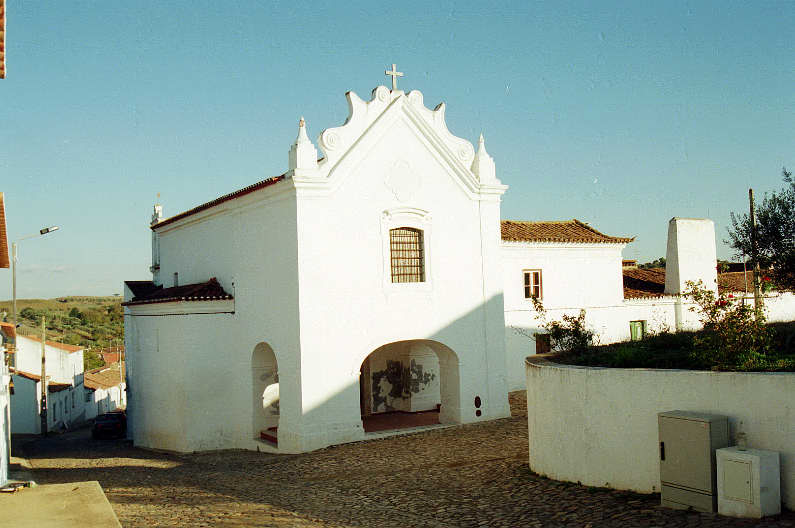 Igreja da Misericórdia - Vila Ruiva - Foto de Claudino Seco - 2003